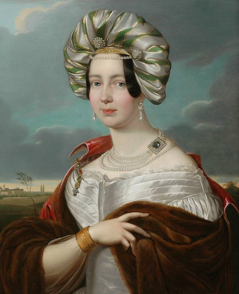 Amalie von Württemberg (1789-1848), Herzogin von Sachsen-Altenburg